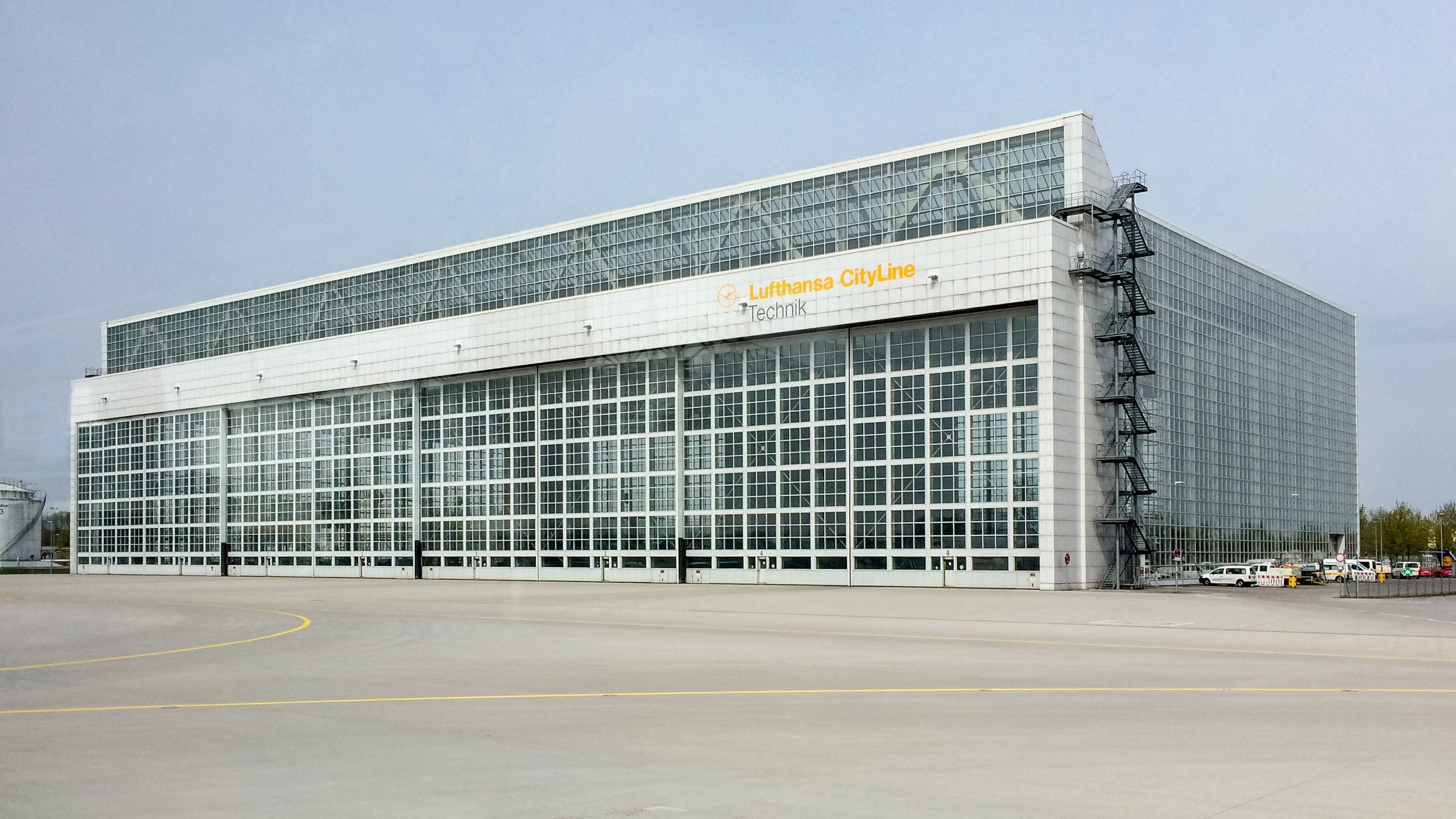 Munich Airport Lufthansa Wartungshalle